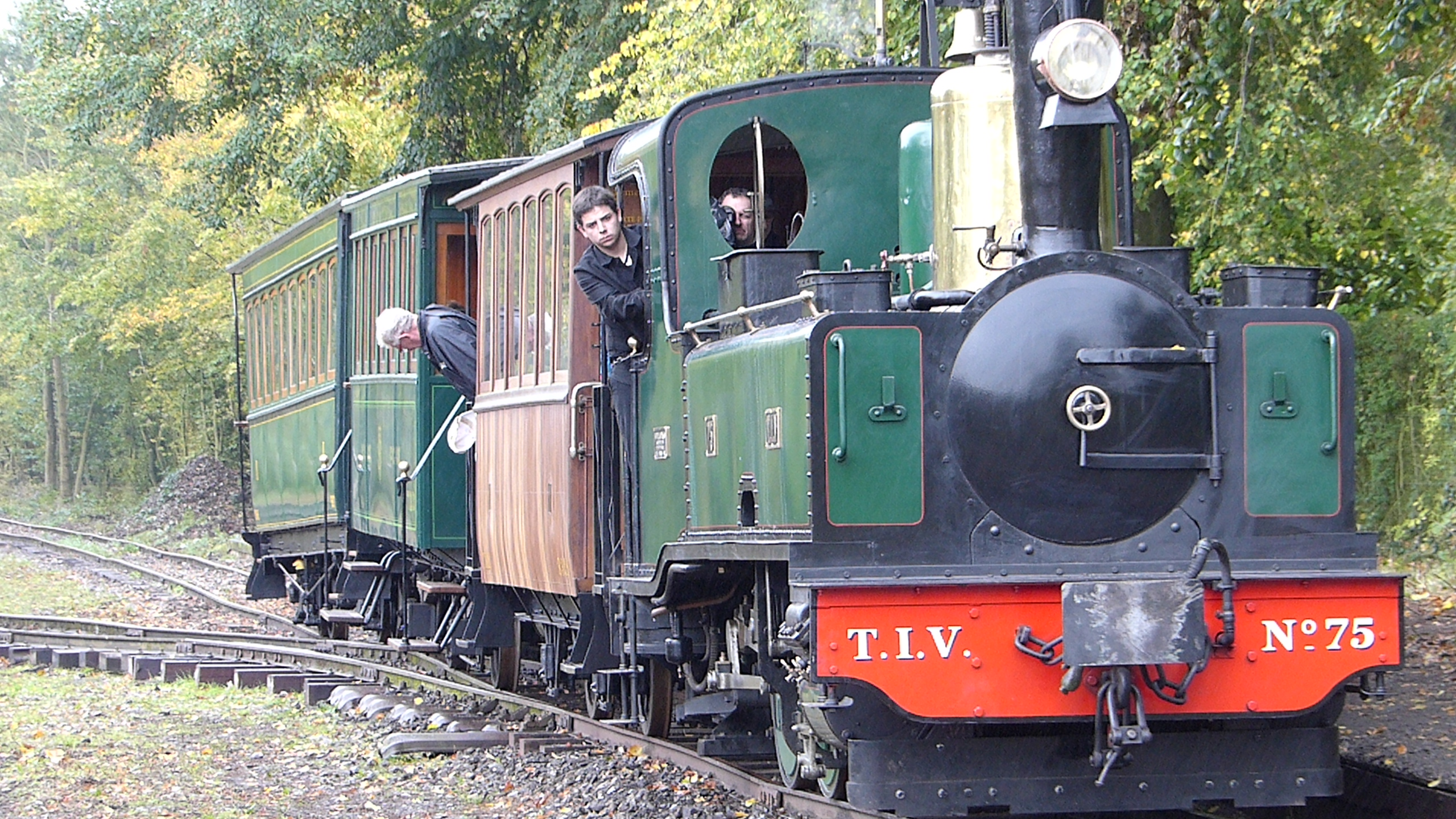 Le train inaugural du MTVS entre en gare de Crèvecoeur-le-Grand, tracté par la 030T n°75 des TIV